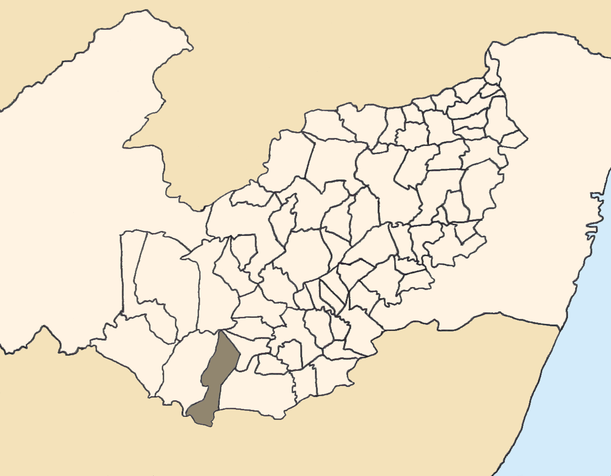 Mapa da mesorregião Agreste de Pernambuco (Brasil) subdivida em municípios. Em destaque, o município de Iati. Map of the brazilian state of Pernambuco (mesorregião Agreste) showing the city of Iati. Imagem tratada com o GIMP. Image made with GIMP.